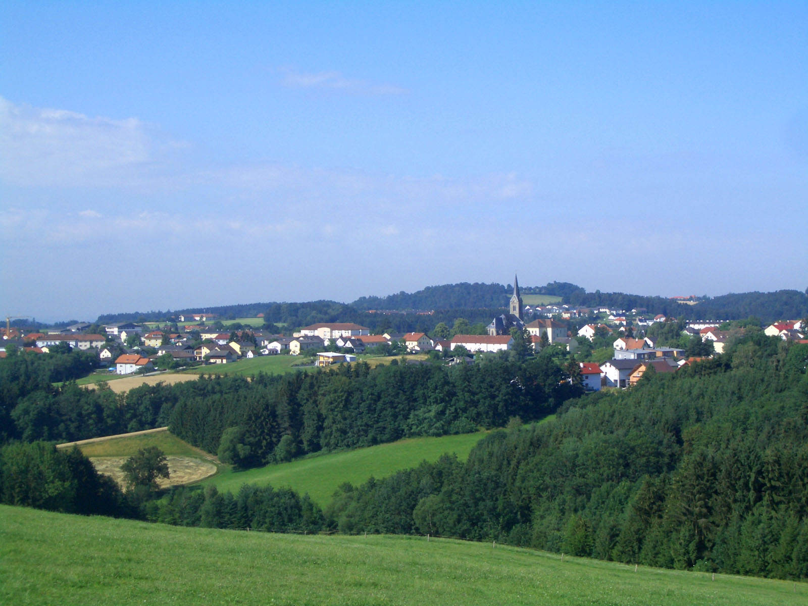 Pregarten